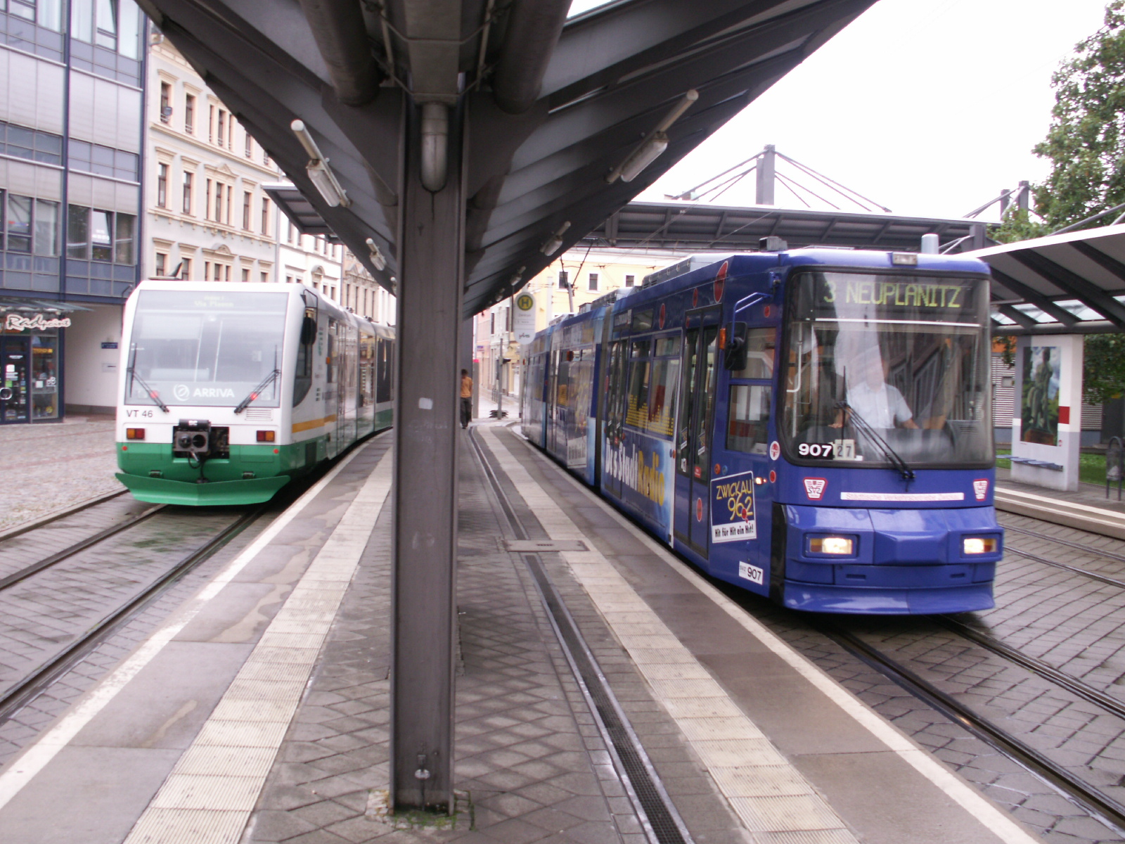 Kombibahnsteig